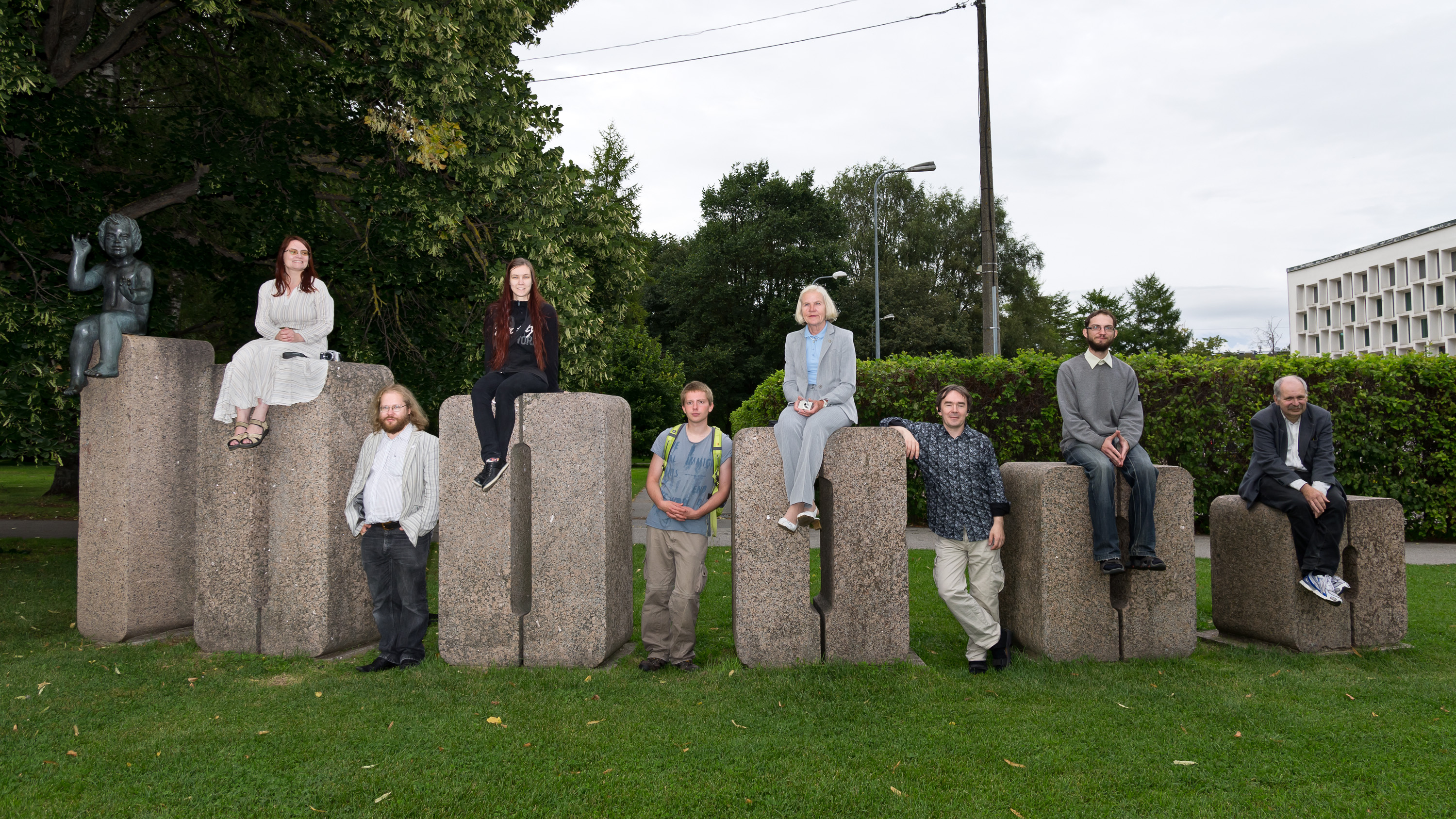 MTÜ Wikimedia Eesti liikmed tähistamas eestikeelse vikipeedia 10 sünnipäeva ja 100 000 artiklit. Tartu, Mare Mikofi skulptuur.